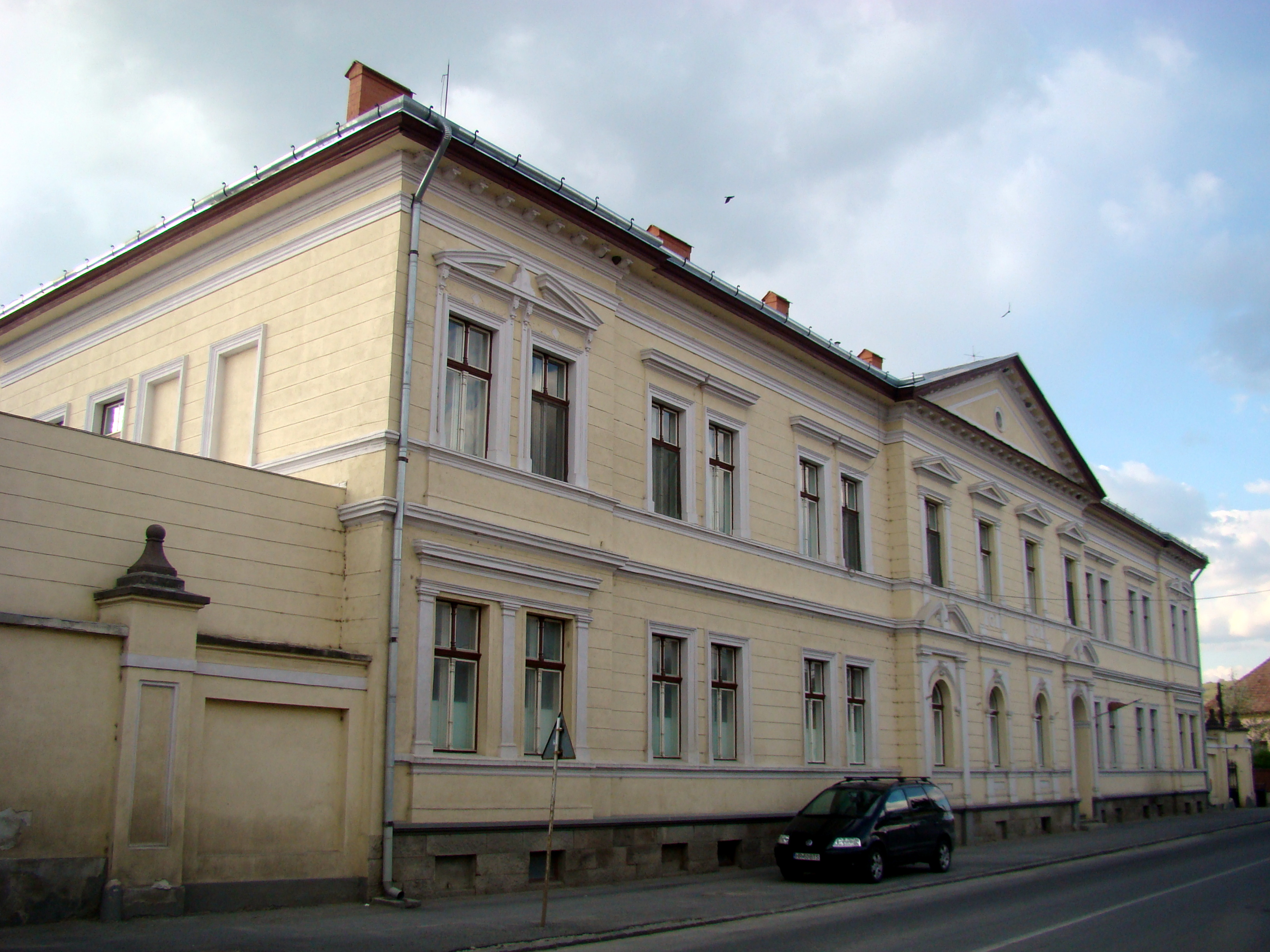 Fostul Tribunal, azi spital orășenesc, oraș Cristuru Secuiesc, str. Kriza János 26 înc. sec. XX